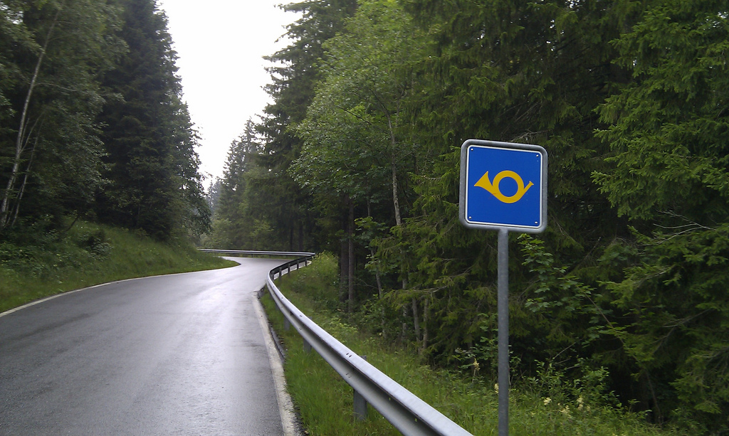 Bergpoststrasse